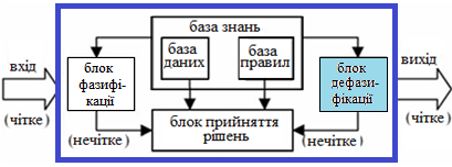 рис7